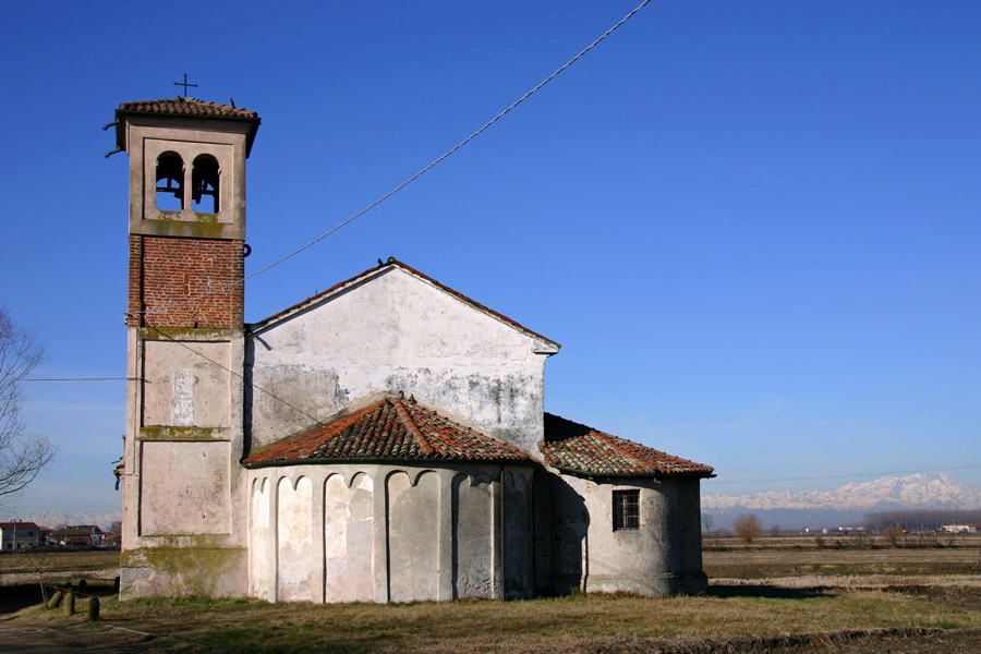 Abside della Pieve di San Giovanni Battista a Vespolate (NO)